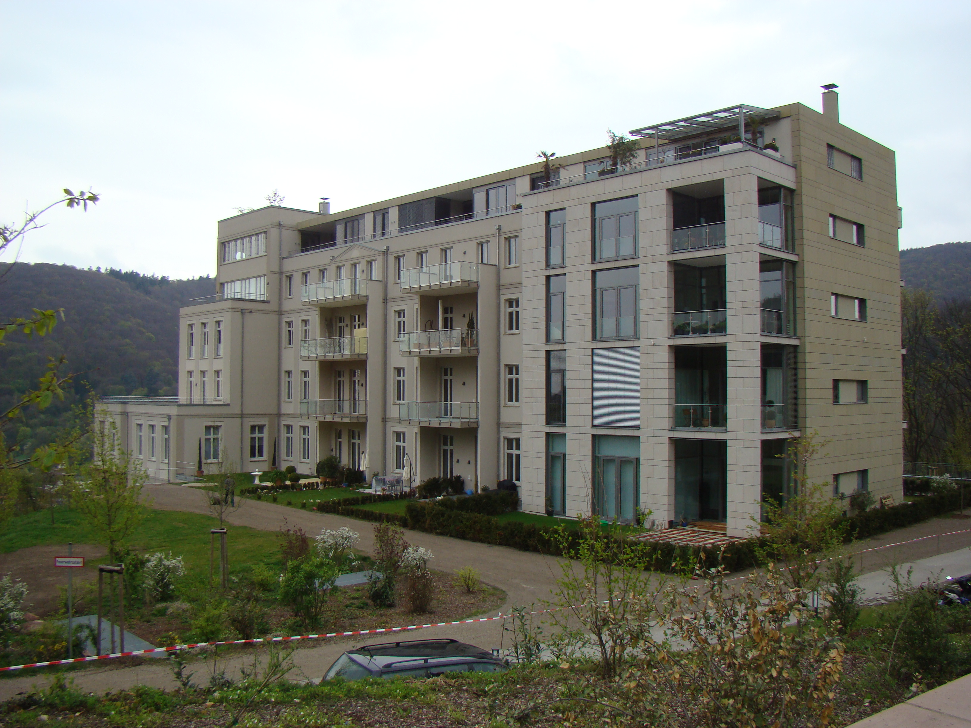 Wohnanlage am Platz des ehemaligen Schlosshotels in Heidelberg